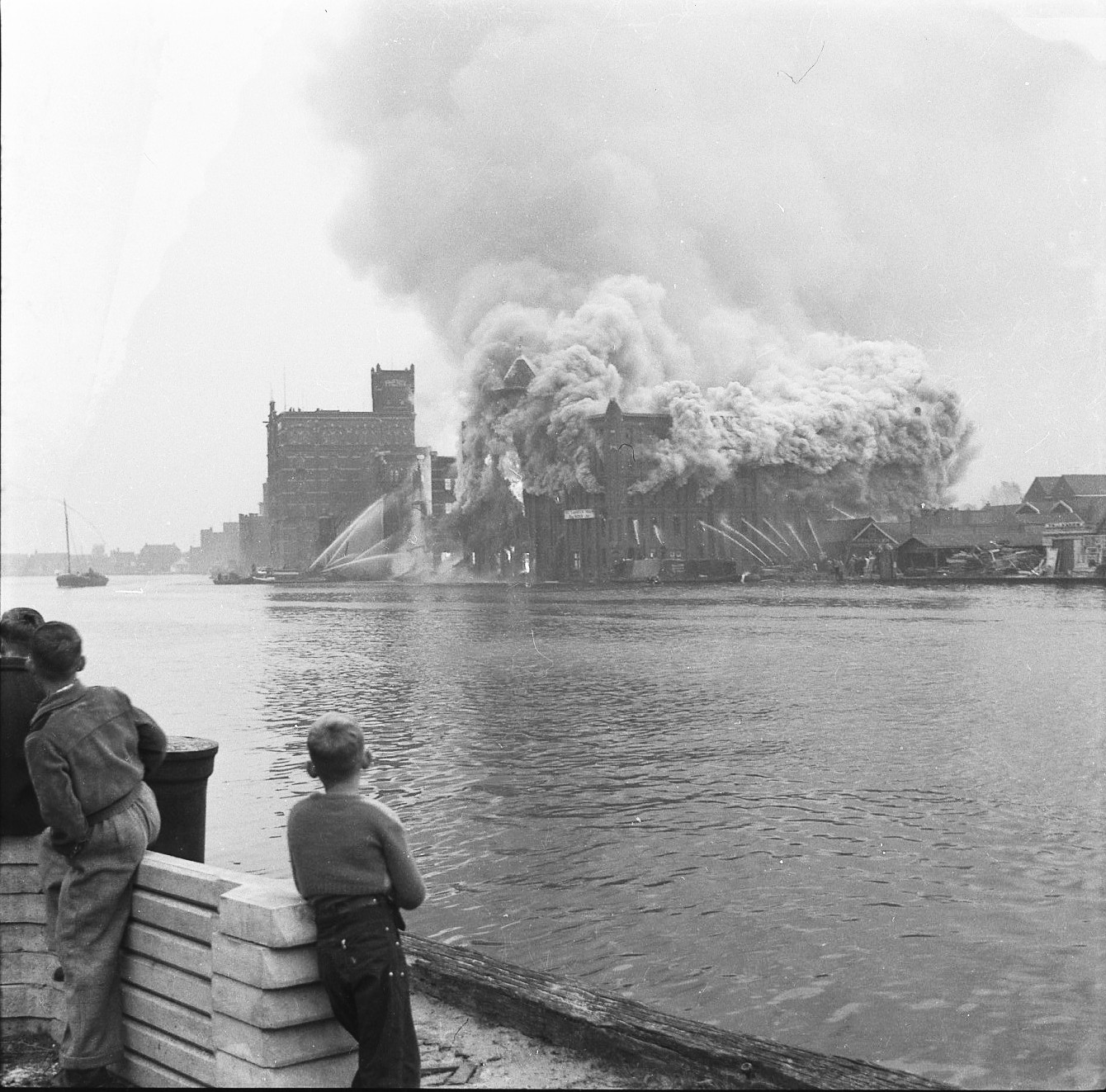 Brand Zaans Veem 15 oktober 1954